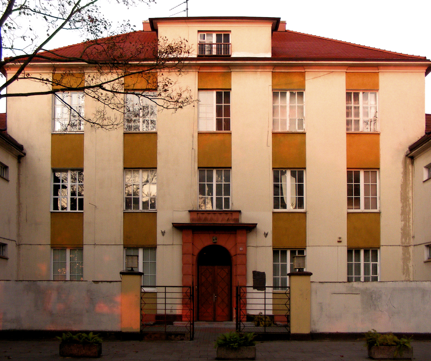 Gdynia, ul. Waszyngtona 38 - Biuro Budowy Portu, obecnie dom mieszkalno-biurowy (zabytek nr rejestr. 1769)